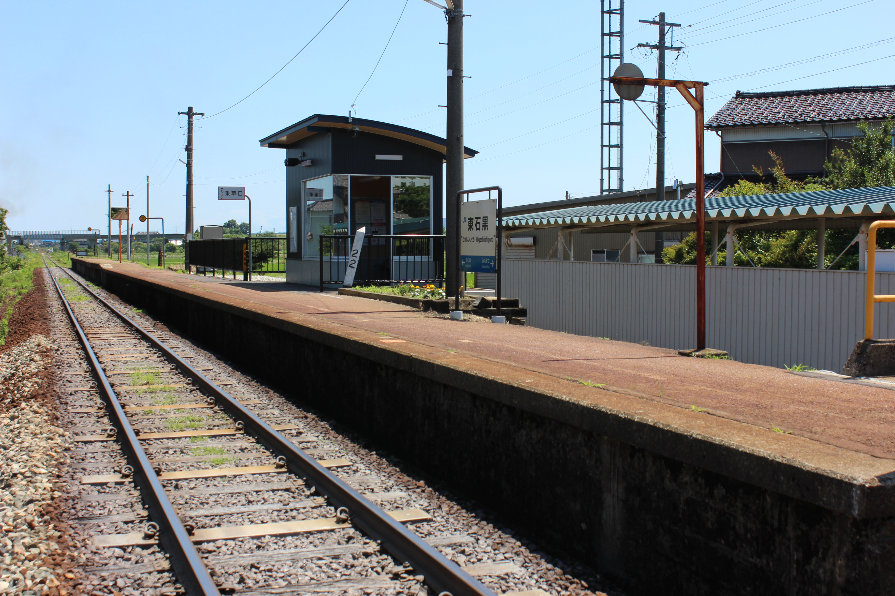 東石黒駅（富山県南砺市） Canon EOS Kiss X5